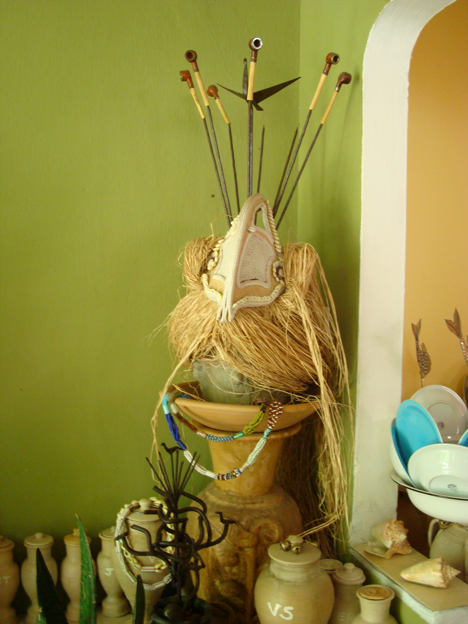 Assentamento sagrado do Orixa Ossaim, Agué.